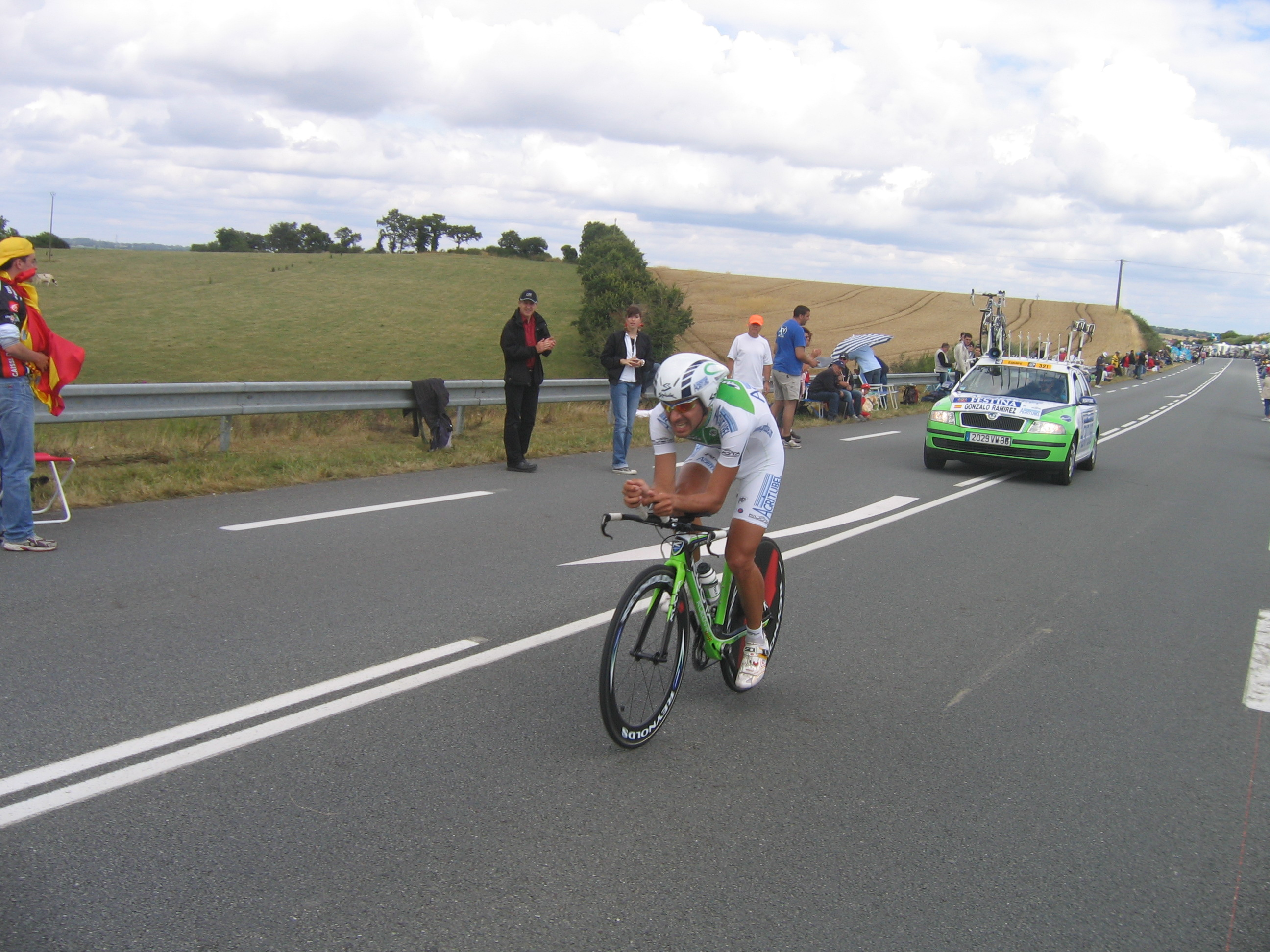 Eduardo Gonzalo Ramirez lors de la 4eme étape du Tour de France 2008